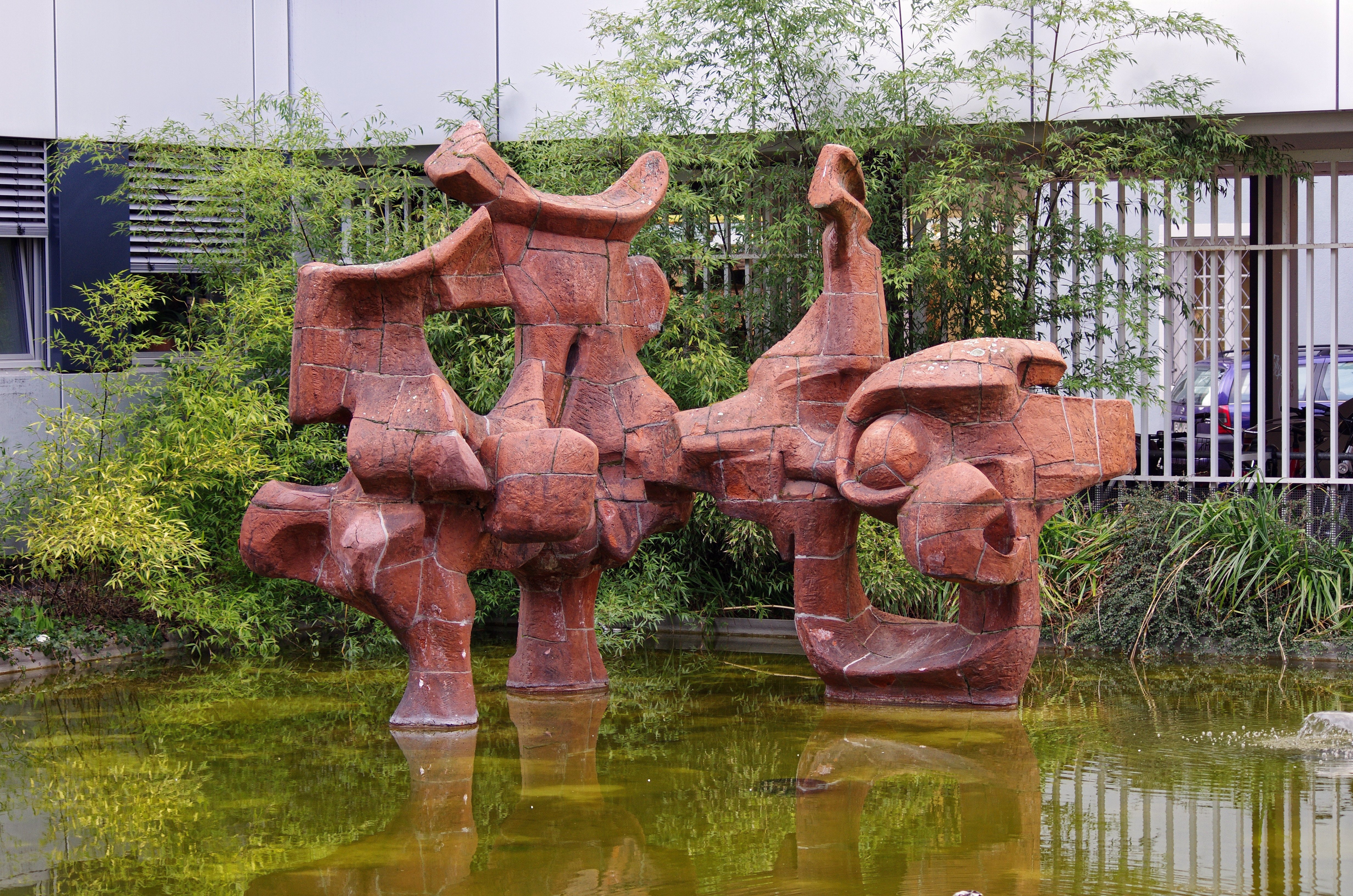 Die Große Terrakotta-Gruppe, Walter Schelenz, Landgericht Freiburg